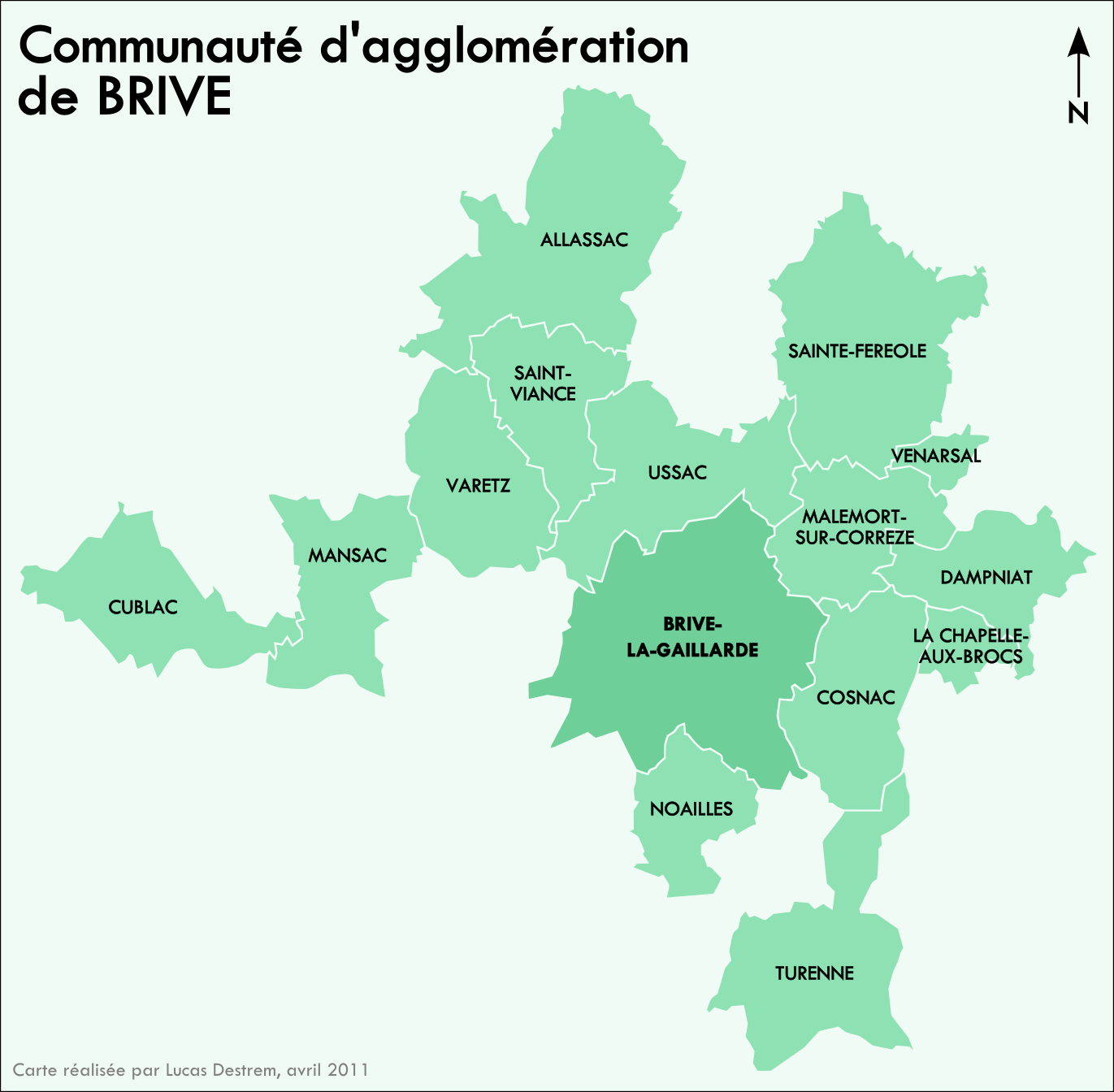 Carte des communes de la Communauté d'agglomération de Brive (Corrèze, France)